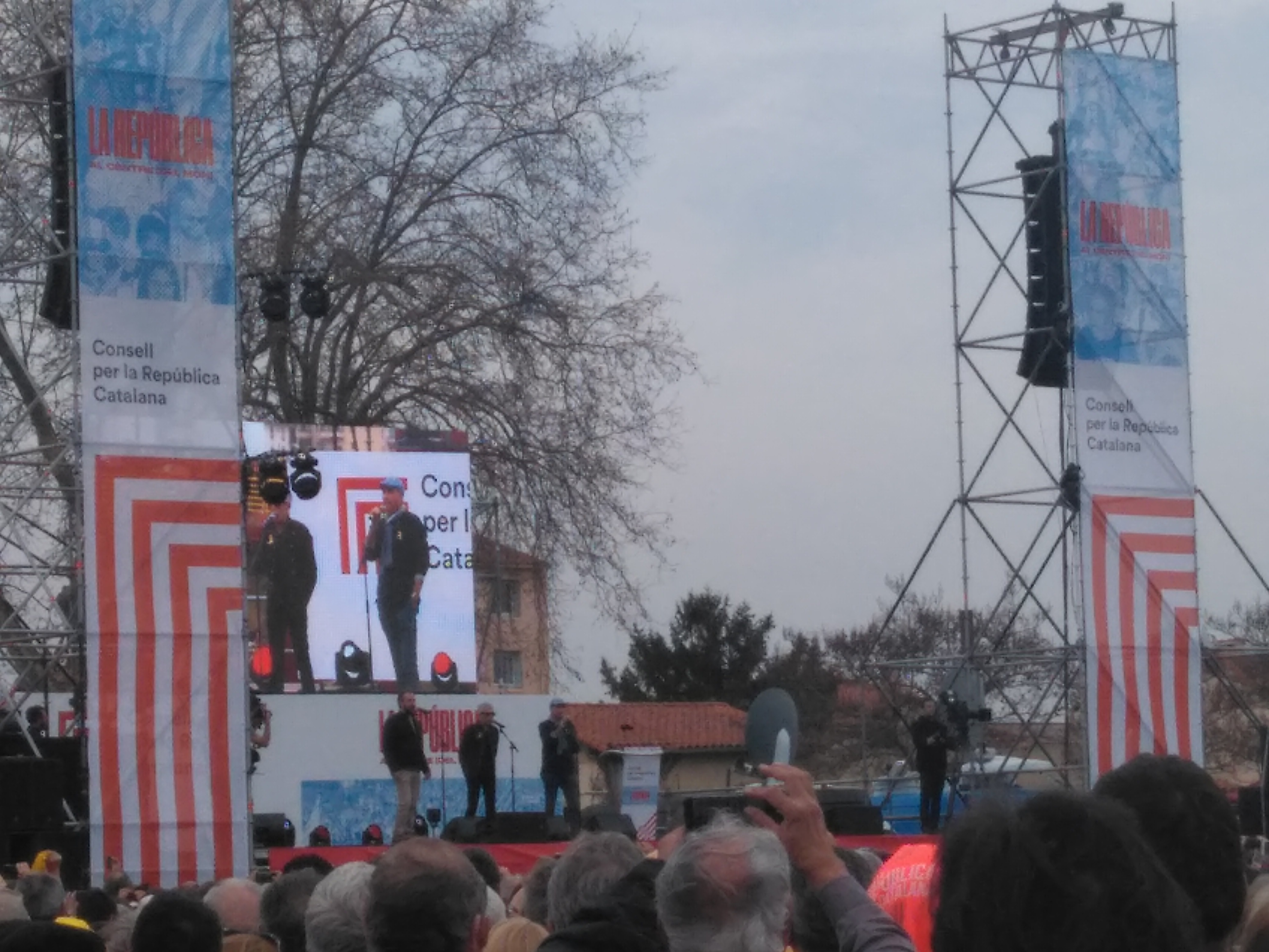 La República al centre (del món), acte a Perpinyà amb la presidència de l'expresident de la Generalitat de Catalunya Carles Puigdemont, Toni Comín i Clara Ponsatí, tots tres eurodiputats i exiliats.